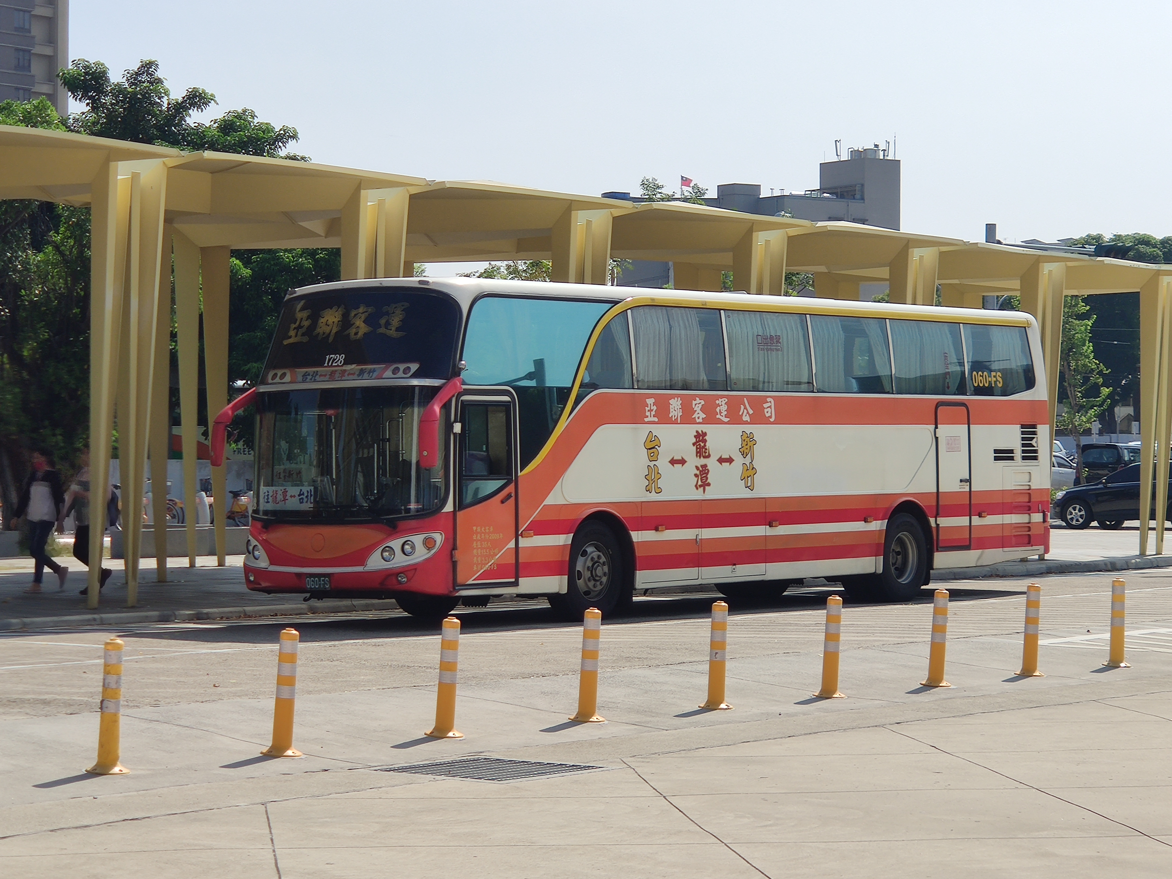 亞聯客運 FUSO RM11GNL大客車 060-FS